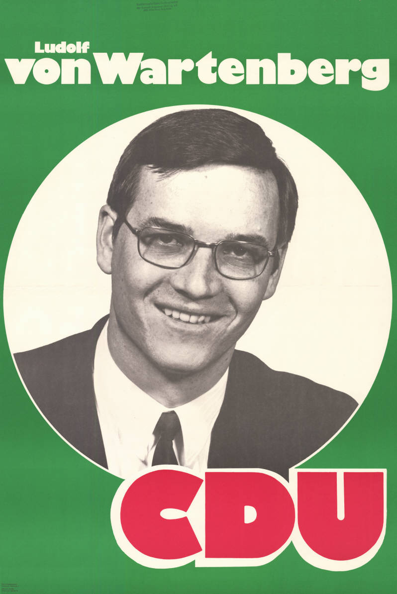 Ludolf von Wartenberg CDUAbbildung:PorträtfotoPlakatart:Kandidaten-/Personenplakat mit PorträtAuftraggeber:CDU in Niedersachsen, HannoverDrucker_Druckart_Druckort:Gebrüder Jänecke, HannoverObjekt-Signatur:10-008 : 305Bestand:Landtagswahlplakate Niedersachsen (10-008)GliederungBestand10-18:Landtagswahlplakate Niedersachsen (10-008) » CDULizenz:KAS/ACDP 10-008 : 305 CC-BY-SA 3.0 DE